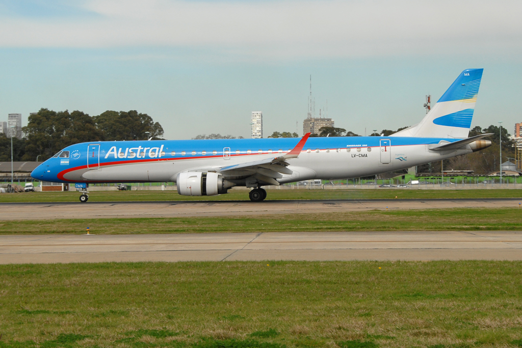 LV-CMA@AEP 11AUG14